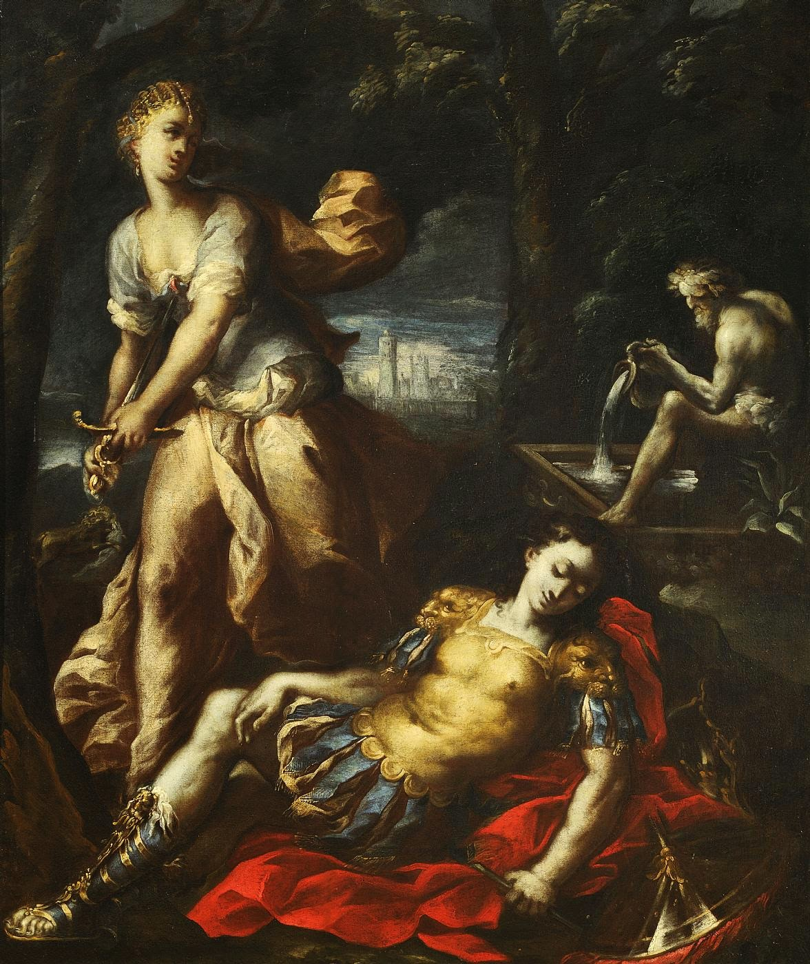 Piramo kaj Tisbe, oleo-sur-tosa pentraĵo de Antoni Landorio, 1652-1690.